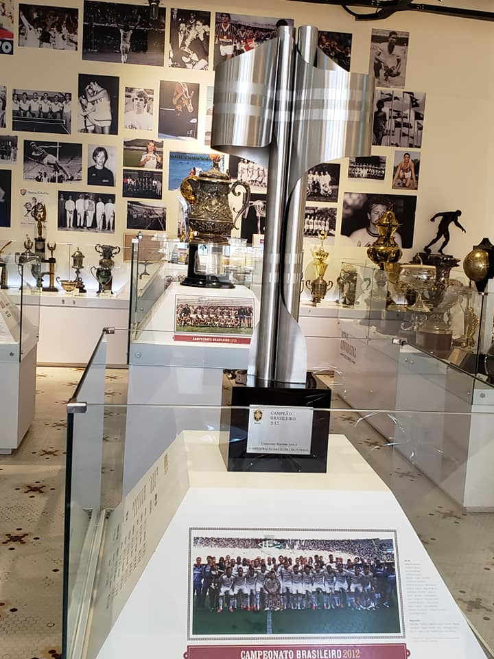 Taça do Campeonato Brasileiro de Futebol de 2012 Primeira Divisão